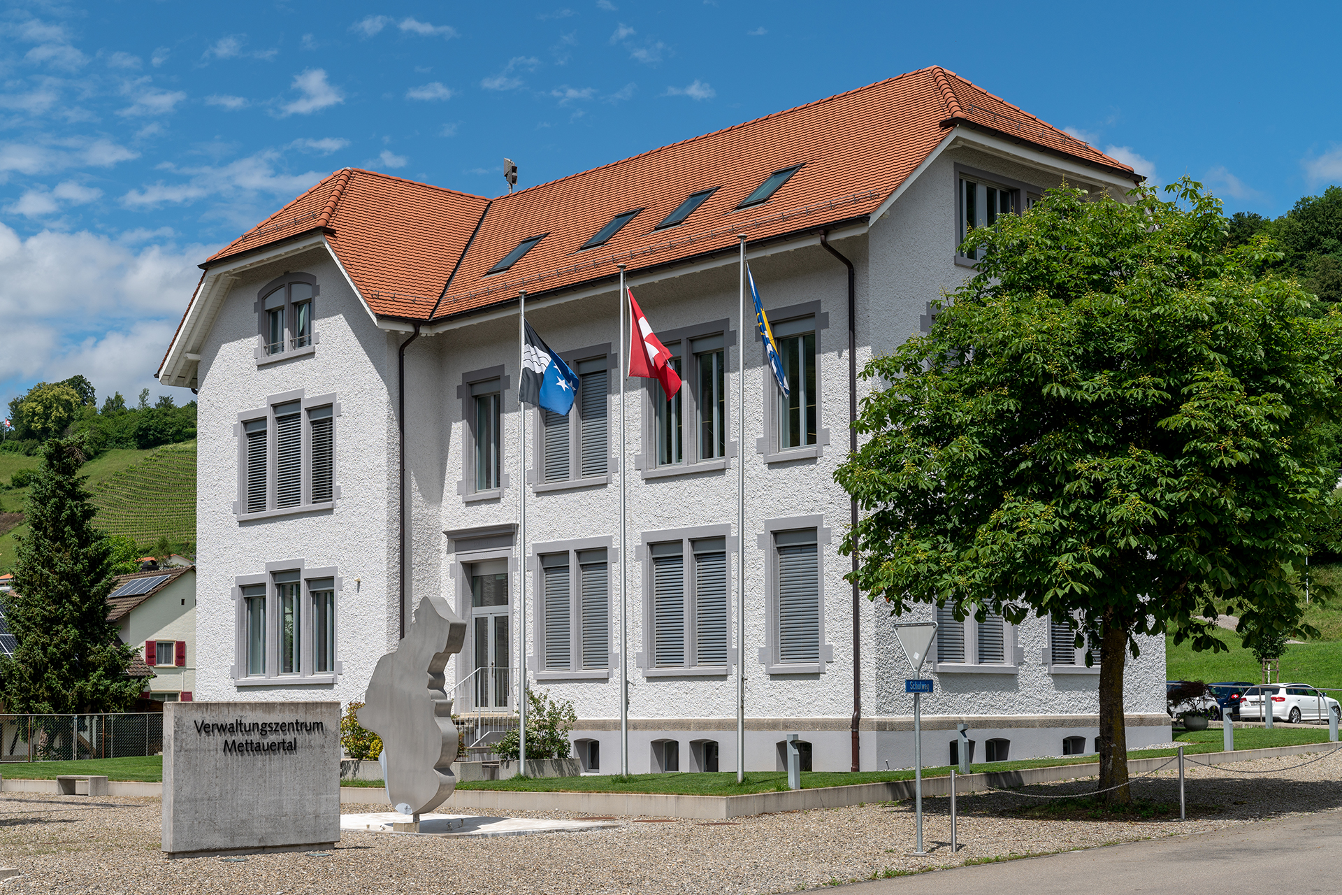 Zentralverwaltung der Gemeinde Mettauertal in Mettau (AG)